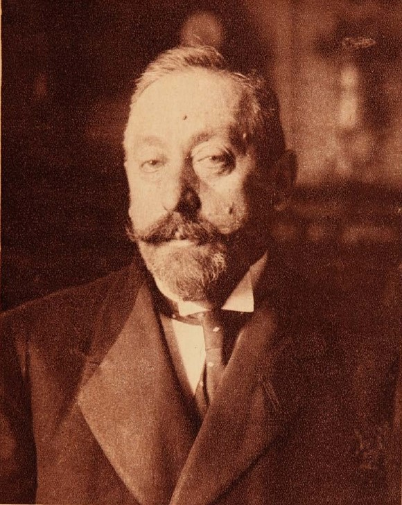 Eduardo Charme Fernández (Talca, el 8 de octubre de 1854 - Santiago, el 10 de octubre de 1920) fue un médico, agricultor, parlamentario y ministro de estado chileno.